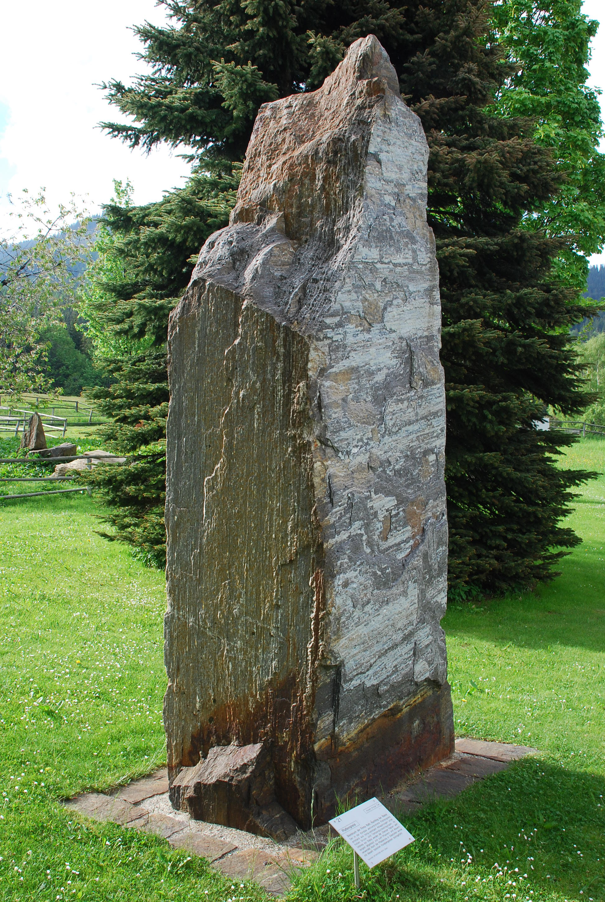 Platte von Plattengneis im Geopark Glashütten. Übertragung des Erklärungsschildes: „Plattengneis. Steinbruch der Fa. Rath, Rachling bei Stainz.Der in der Koralpe weit verbreitete Plattengneis entstand aus tonig-sandigen Ablagerungen unter hohem Druck- und Temperaturbedingungen. Im Umkreis von Stainz werden die „Stainzer Platten“ seit langem abgebaut und zum Pflastern und Mauern verwendet. Auch die Pflasterung in Glashütten wurde mit diesem typischen Koralpengestein durchgeführt.“